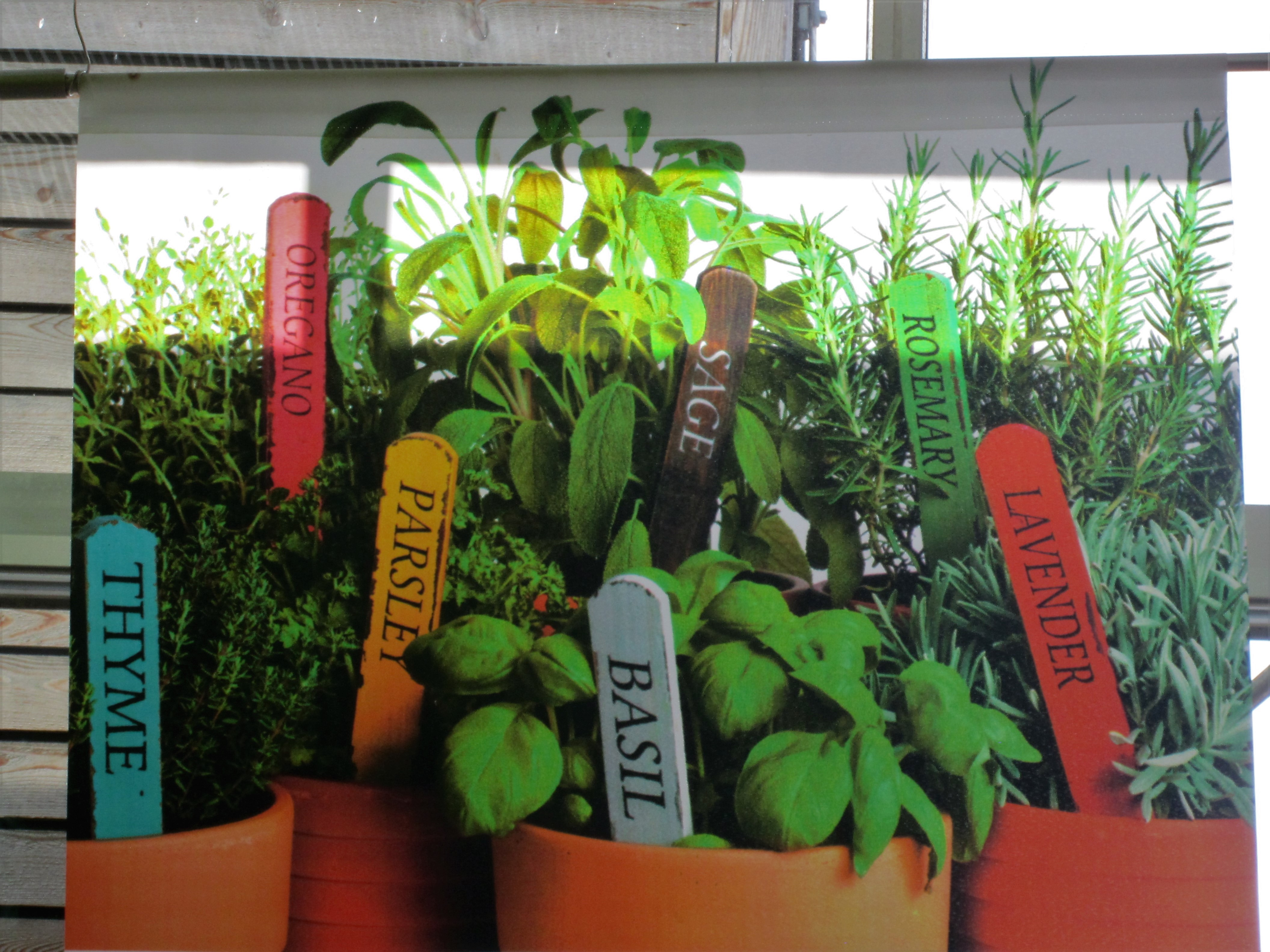 Das Poster enthält eine Anspielung auf den Vers "Parsley, sage, rosemary and thyme" in dem Song "Scarborough Fair", der vor allem durch Simon & Garfunkel weltweit bekannt wurde. Das Poster befand sich im September 2019 im Café im "Park der Gärten" in Bad Zwischenahn.